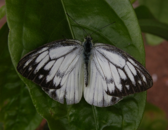 Cepora nerissa adult